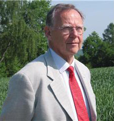 André Billardon, maire du Creusot